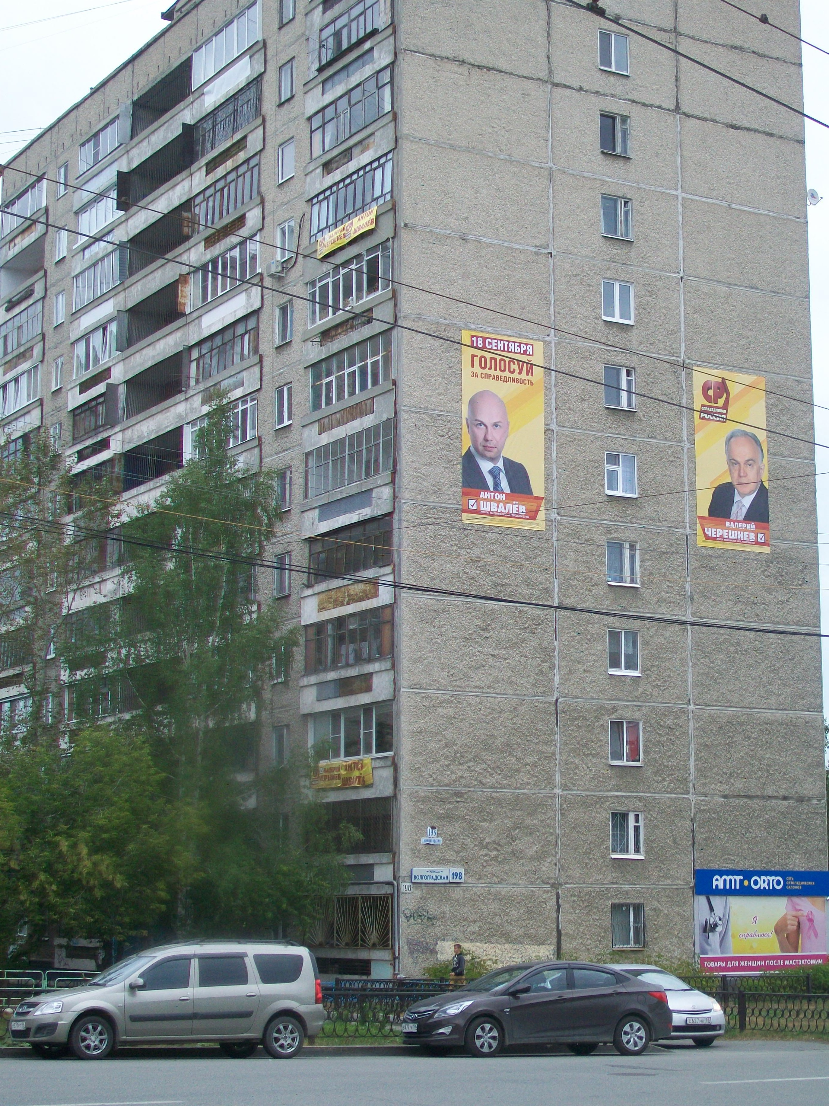 Дом в Екатеринбурге, увешанный баннерами Справедливой России перед выборами 2016 года